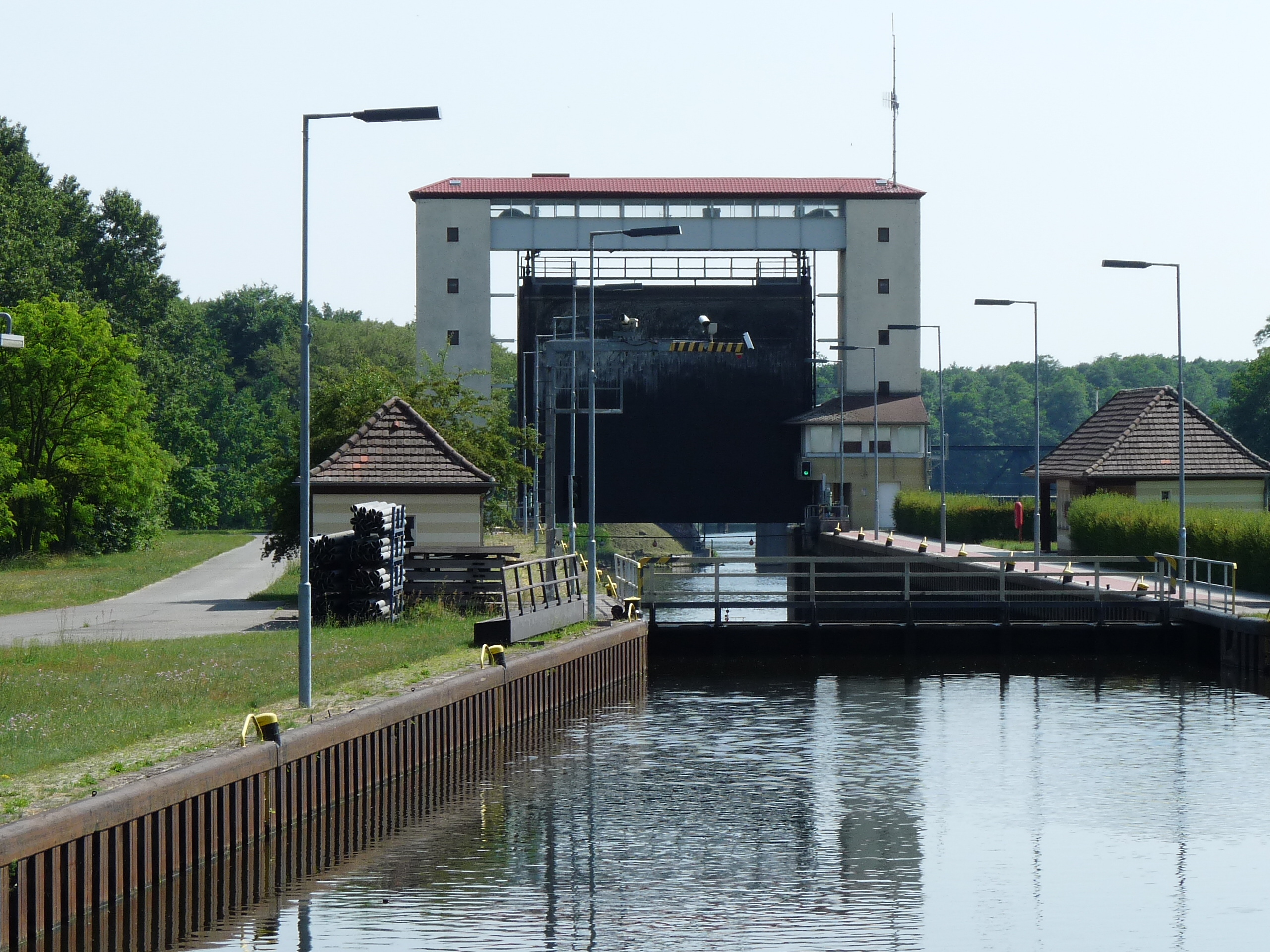 Die Lehnitzschleuse Blickrichtung zu Tal aus dem Oberwasser.